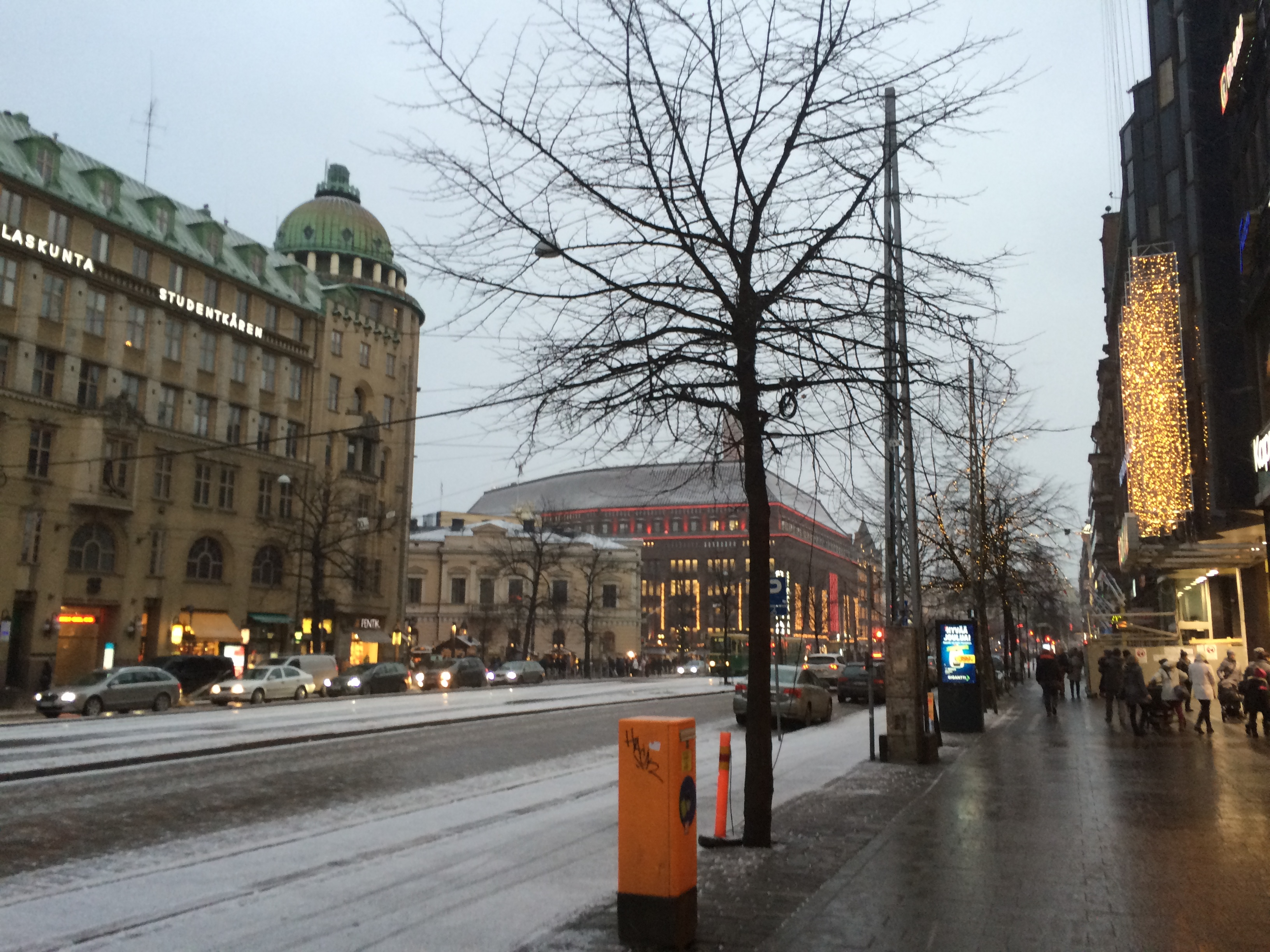 Kamppi, Helsinki, Finland